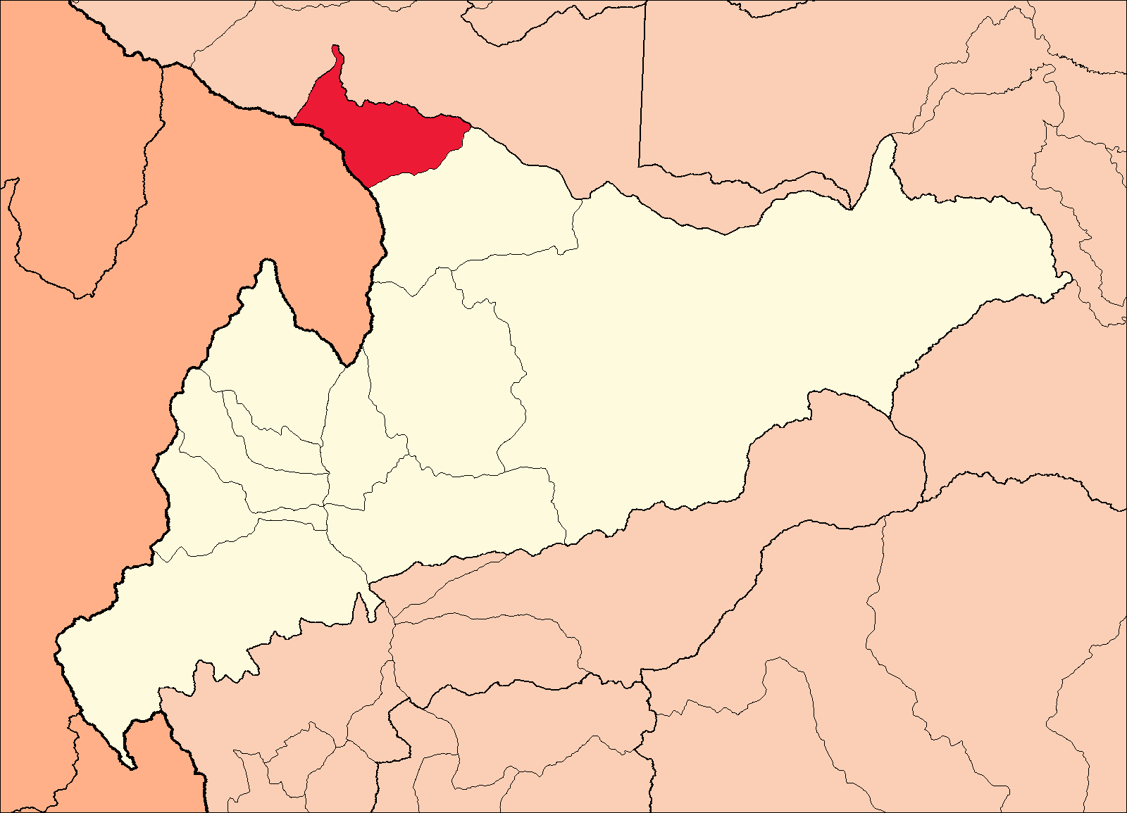 Área del distrito de Arancay dentro de la provincia de Huamalíes.